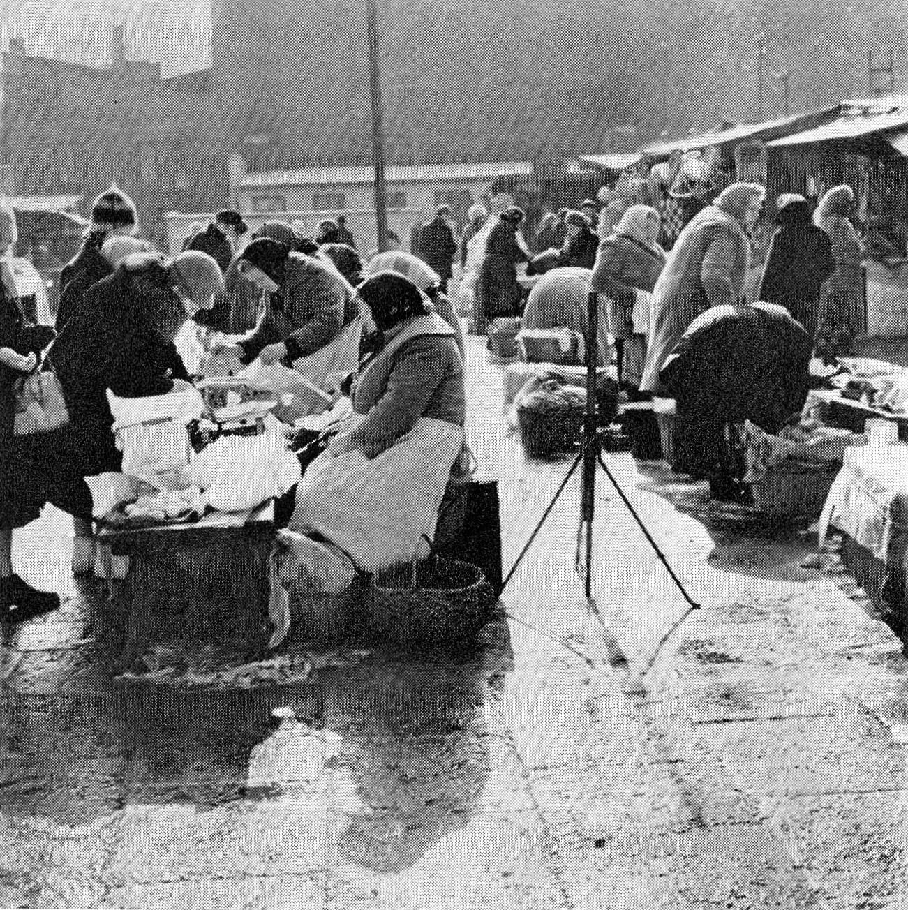 Bazar Różyckiego w Warszawie